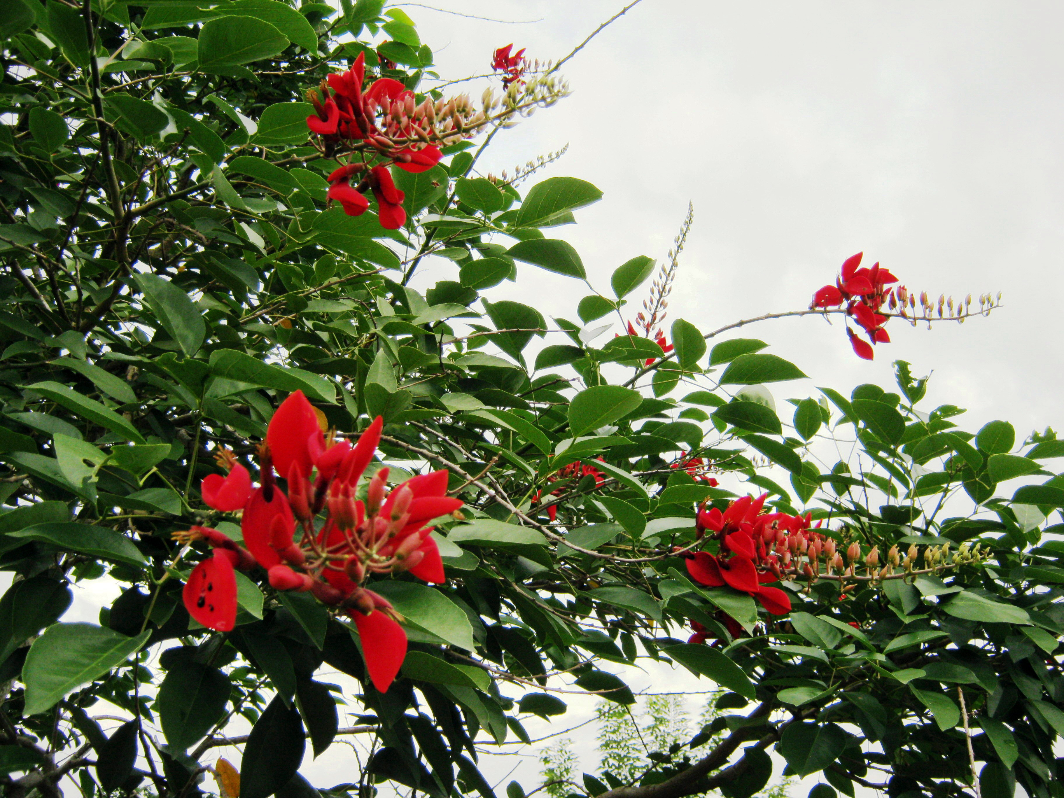 Vông mồng gà (Erythrina cristagalli) thuộc họ Đậu (Fabaceae). Có nơi gọi là "hoa Hoàng Hậu", vì hoa có màu đỏ nên gọi vậy. . Ảnh chụp tại Sa Đéc, Việt Nam.